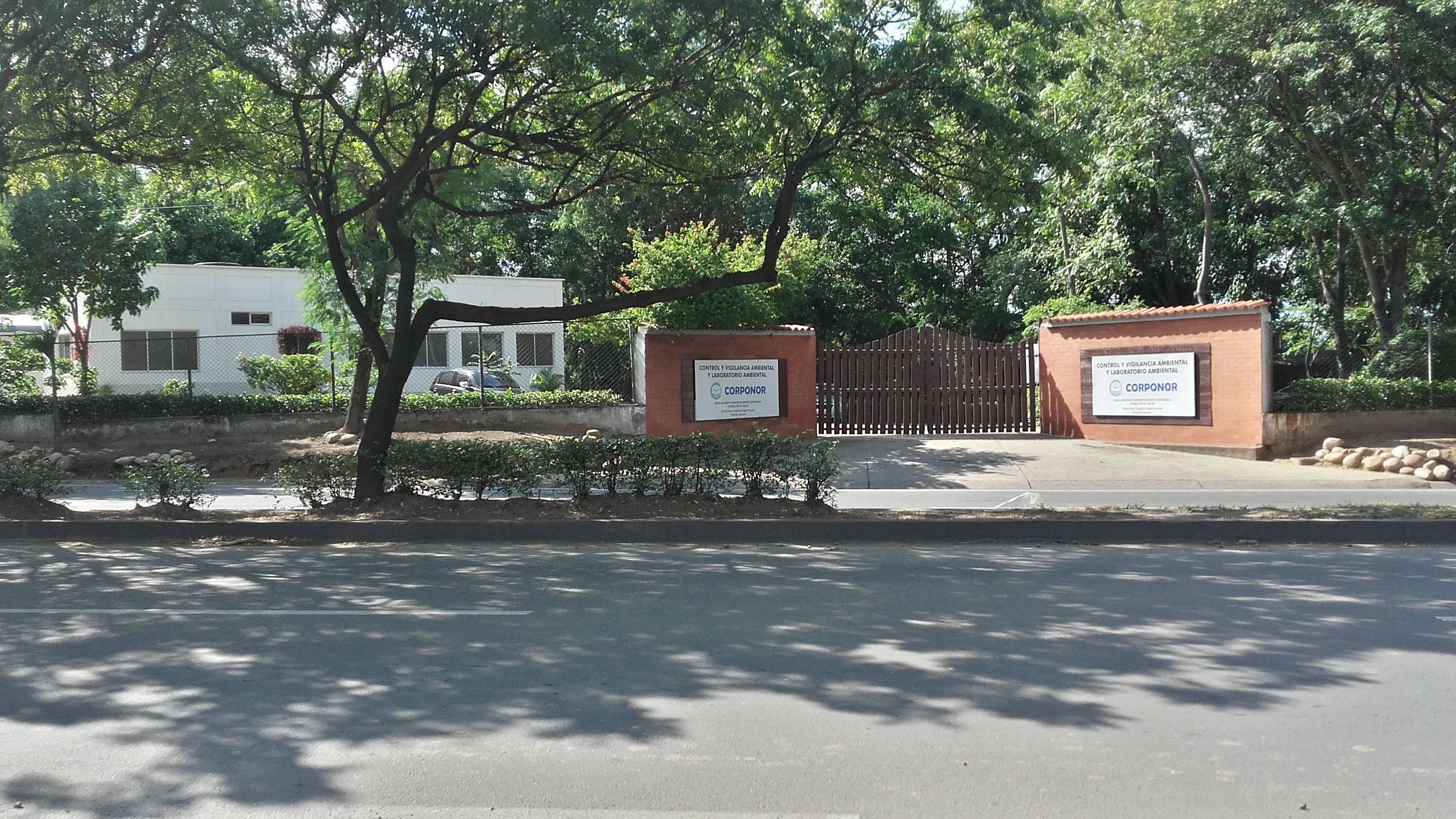 ndnfnrnrnfnfkfnngngmgmgmgmg